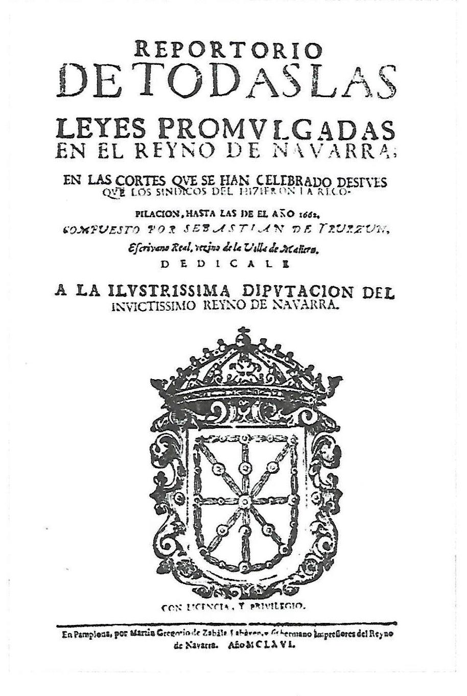 Repertorio de todas las leyes del reino de Navarra, de Sebastián de Irurzun, impreso en Pamplona, por Martín Gregorio de Zabala, 1666